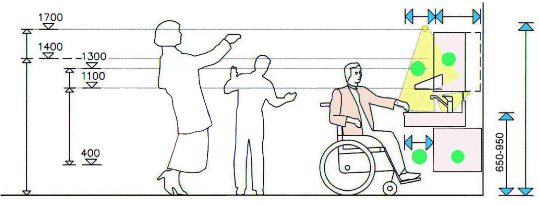 Barrierefreie Küche